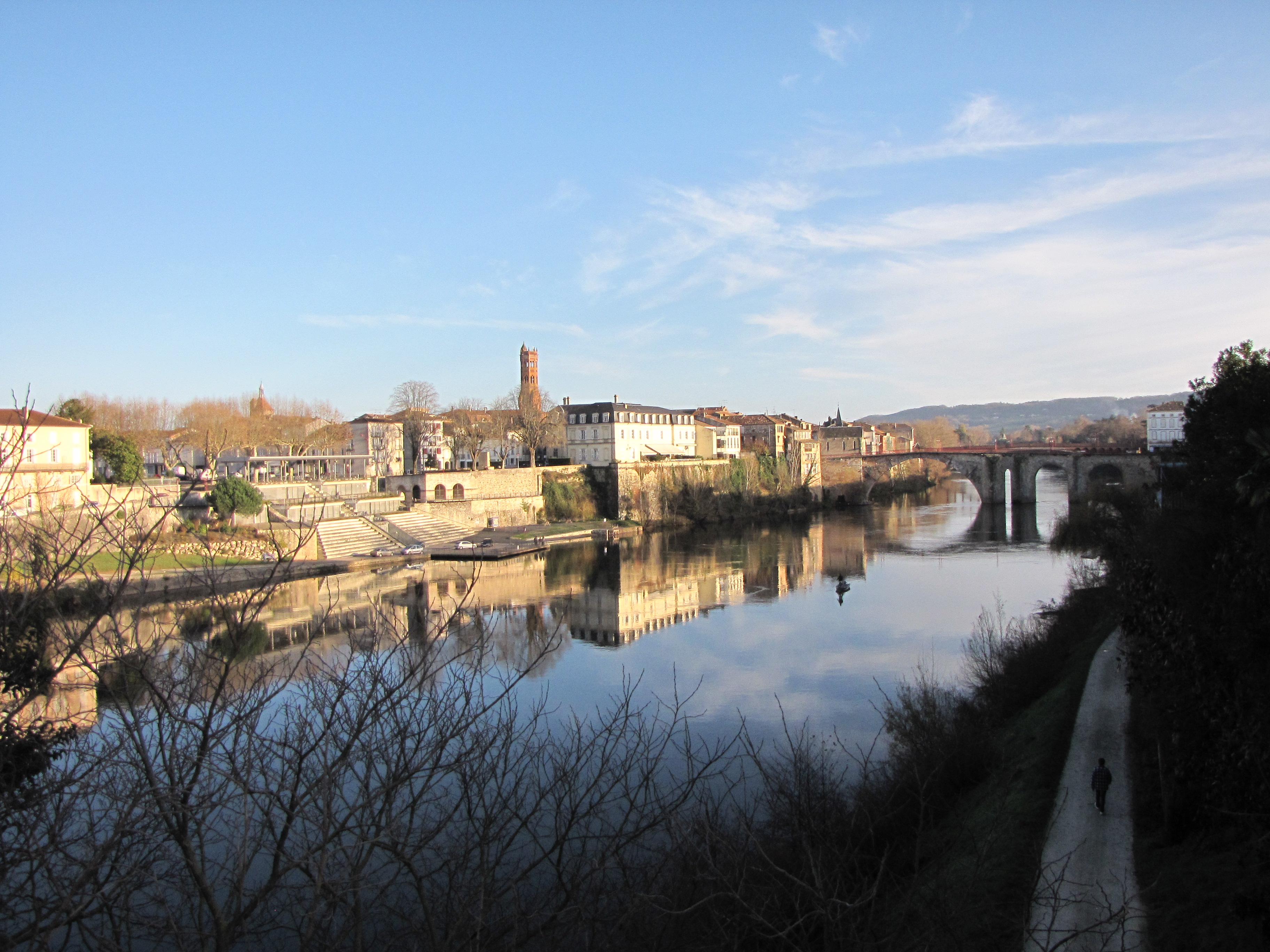 Villeneuve-sur-Lot